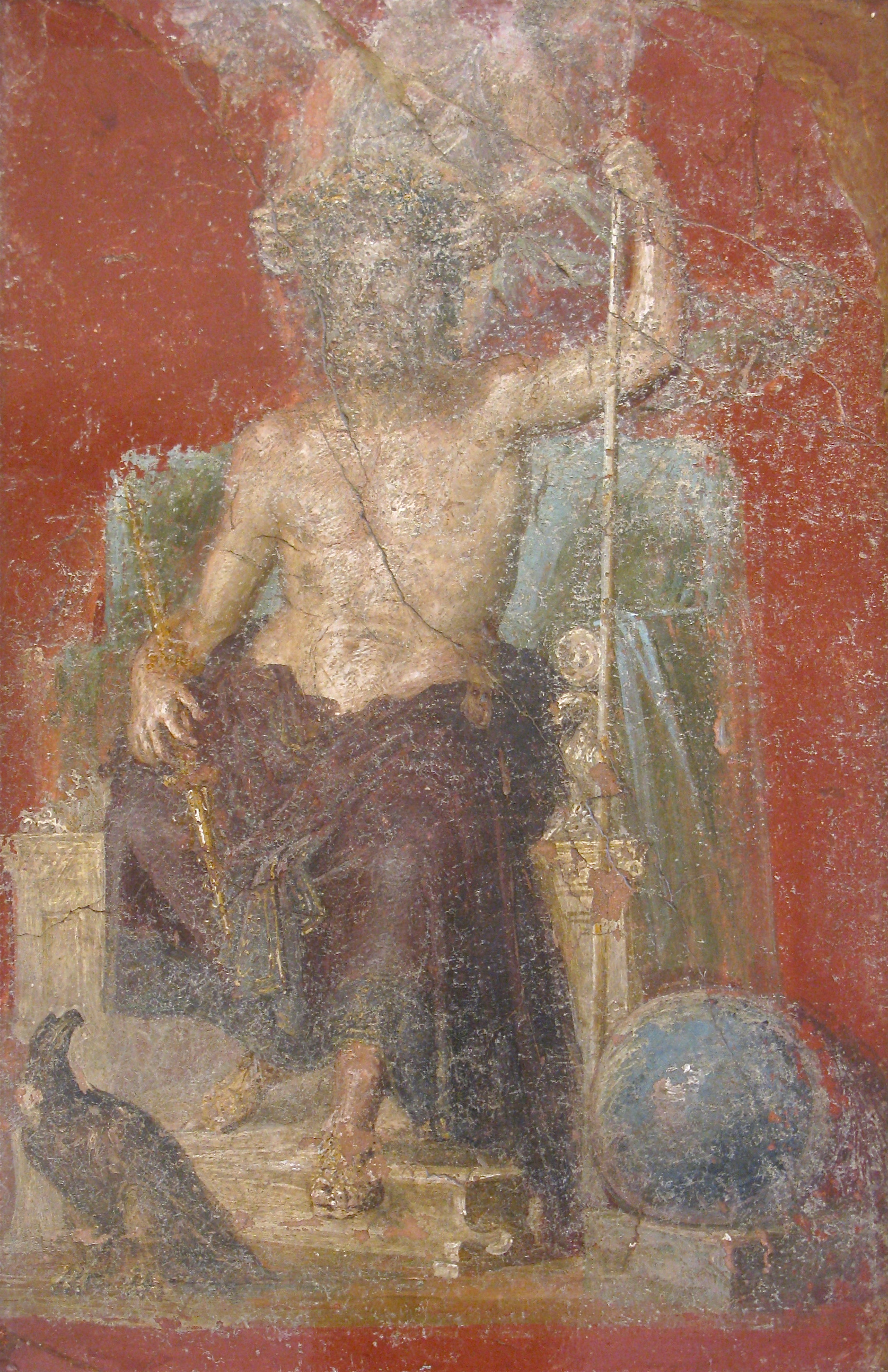 Zeus, Museo archeologico nazionale di Napoli (inv. nr.9551). Da Pompei, Casa dei Dioscuri.